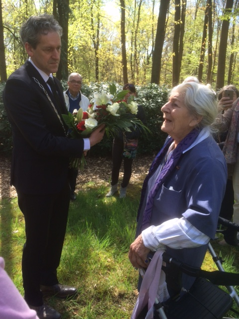 Betty Bausch met de burgemeester van Rhenen Drs. H. van der Pas. Herdenking bij het kruis op de berg